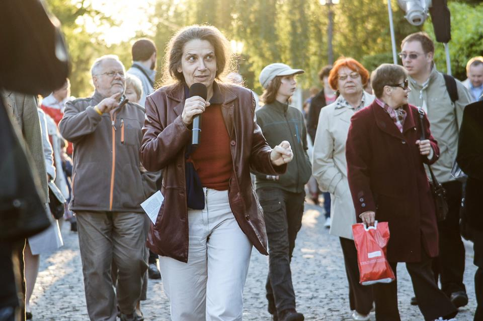 Festiwal Otwarte Ogrody Sadyba 2012: otwarcie szlaku latarni gazowych, prowadzi Maria Sołtys.